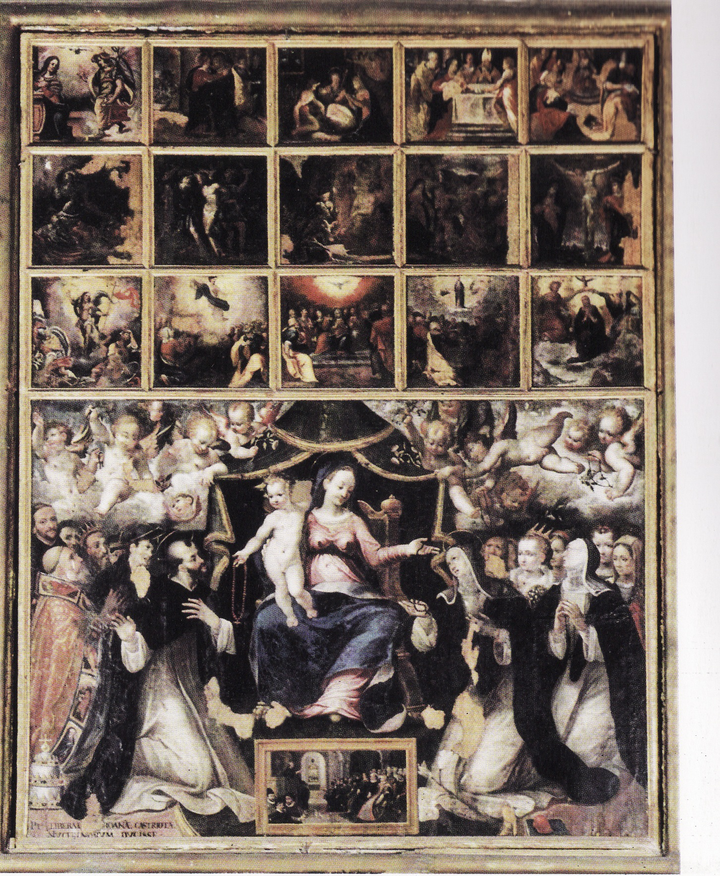 Aert Mytens (Bruxelles 1541 - Roma 1602, il cui nome fu italianizzato in Rinaldo Fiammingo): Madonna del Rosario. Cappella della cattedrale di San Prisco a Nocera Inferiore